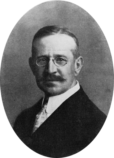 Bertil Buhre (1863-1930)